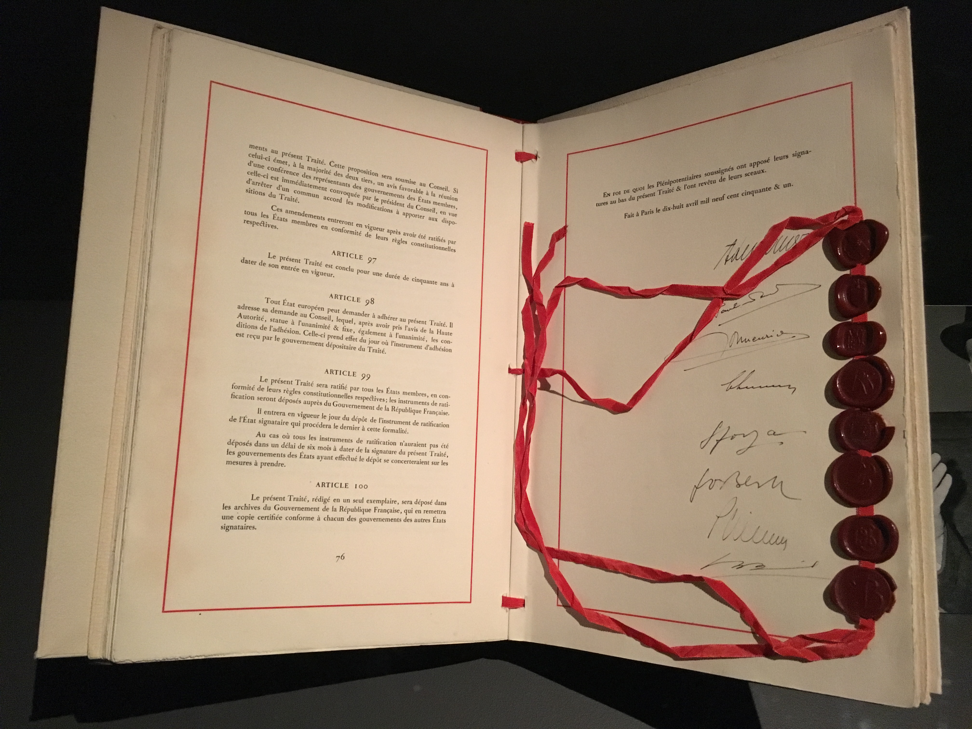 Traité instituant la Communauté européenne du charbon et de l'acier (CECA). Paris, 18 avril 1951.